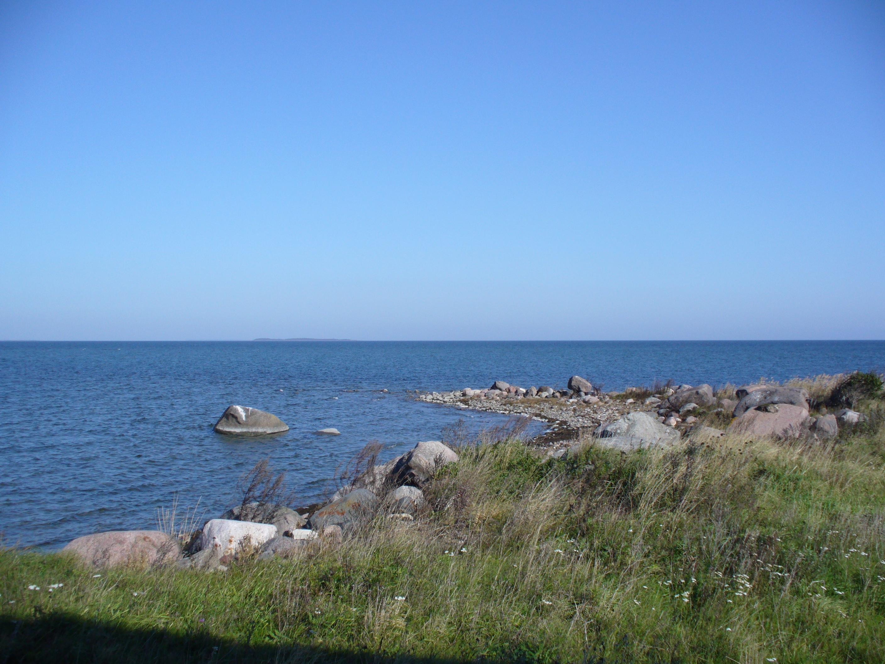 Seanina. Eemal paistab Kõverlaid.